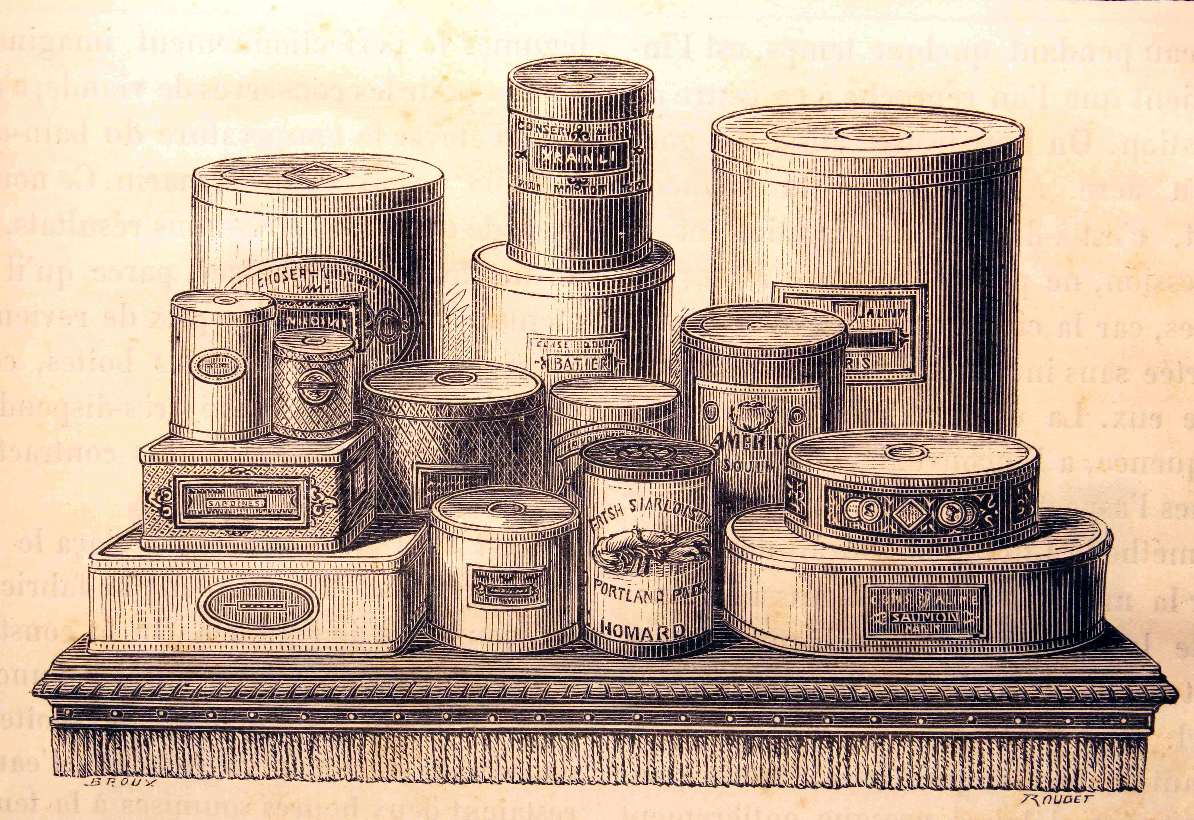 Ilustraciones de la obra : Les merveilles de l'industrie ou, Description des principales industries modernes / par Louis Figuier. - Paris : Furne, Jouvet, [1873-1877]